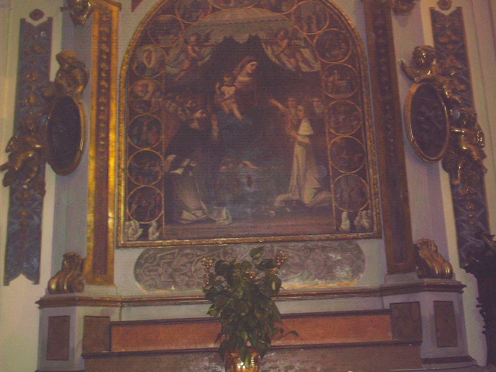 Tela rappresentante la Madonna che dona il Rosario a San Domenico e Santa Caterina sita nella chiesa della Madonna della Valle a Scanno, L'Aquila